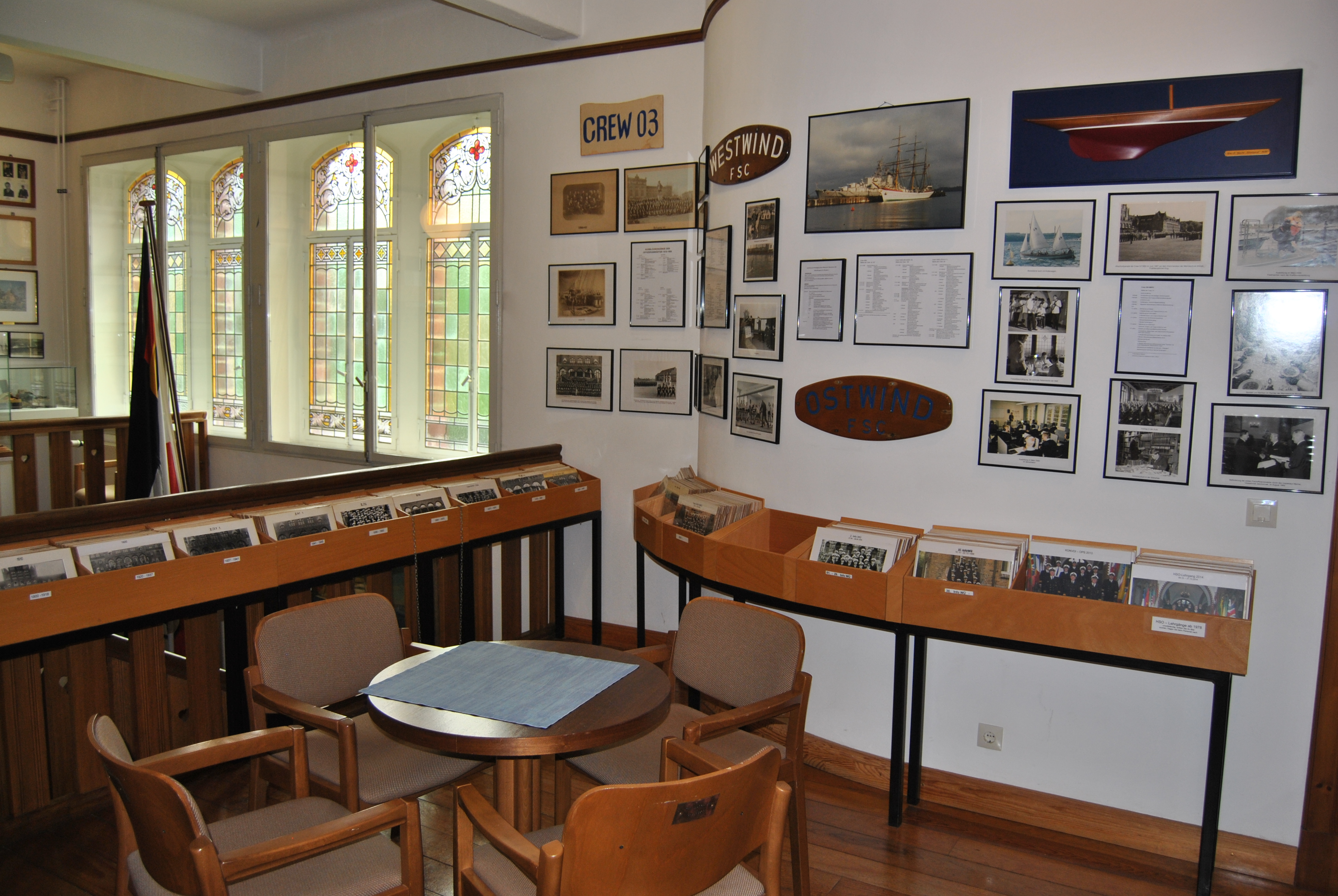 Ausstellungsraum zur Geschichte und Ausbildung der deutschen Marine, Crewfoto-Sammlung, Wehrgeschichtliches Ausbildungszentrums der Marineschule Mürwik.